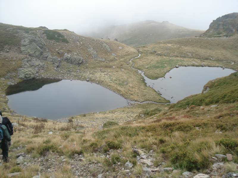 Pogled na Salakovskite ezera